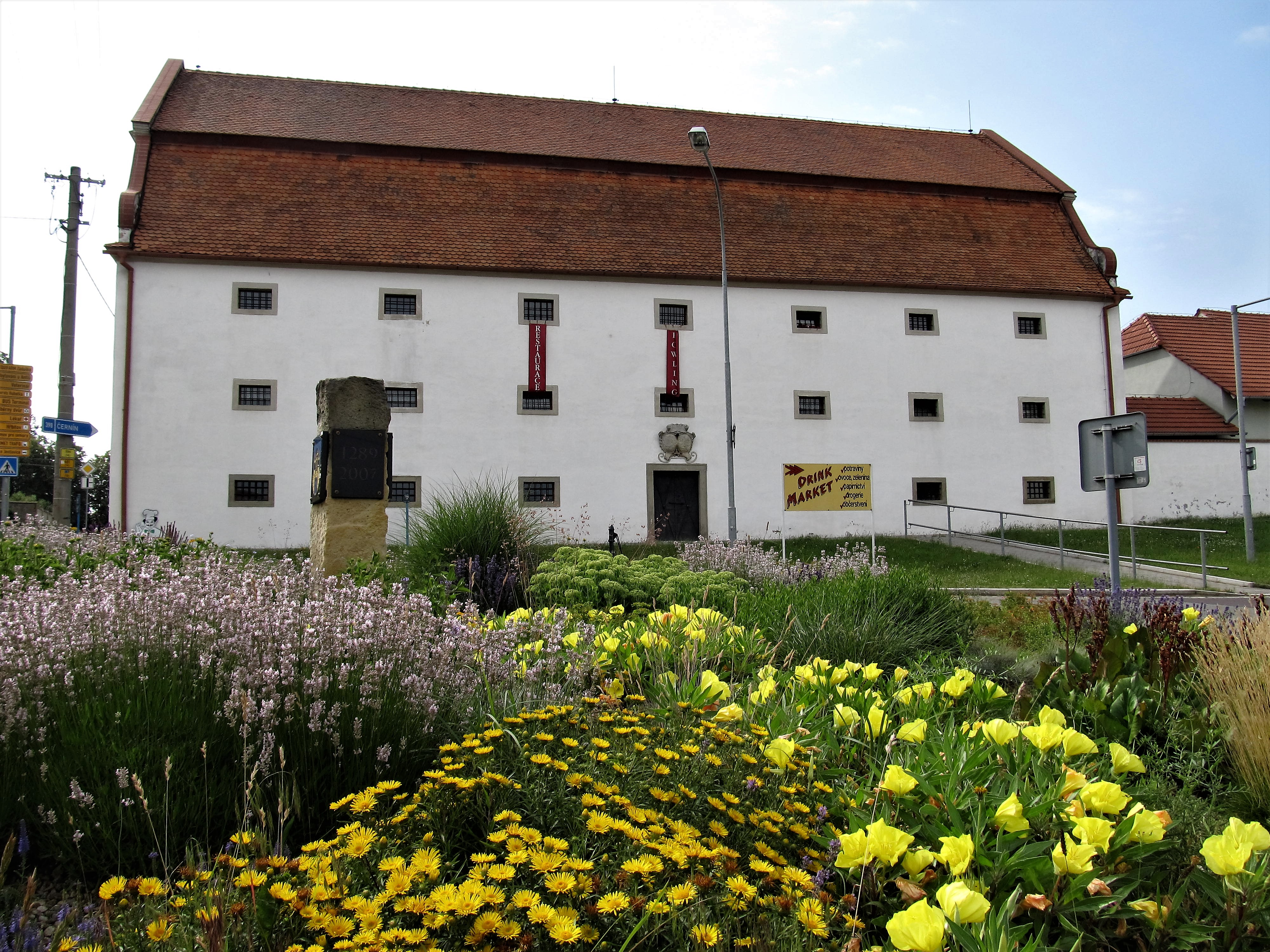 Barokní sýpka v Jevišovicích, pohled z náměstí